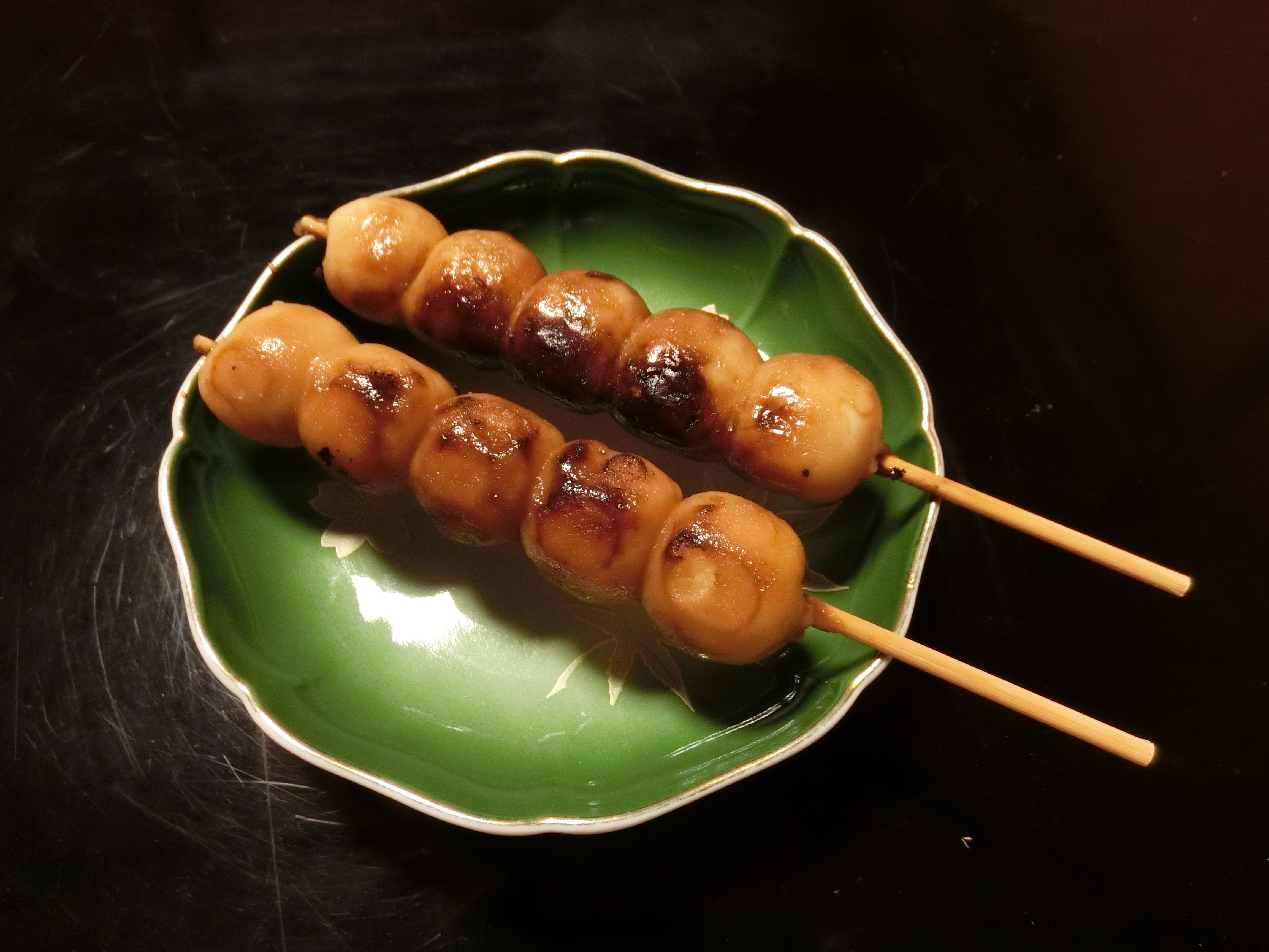 高山市の駄菓子 みたらし団子